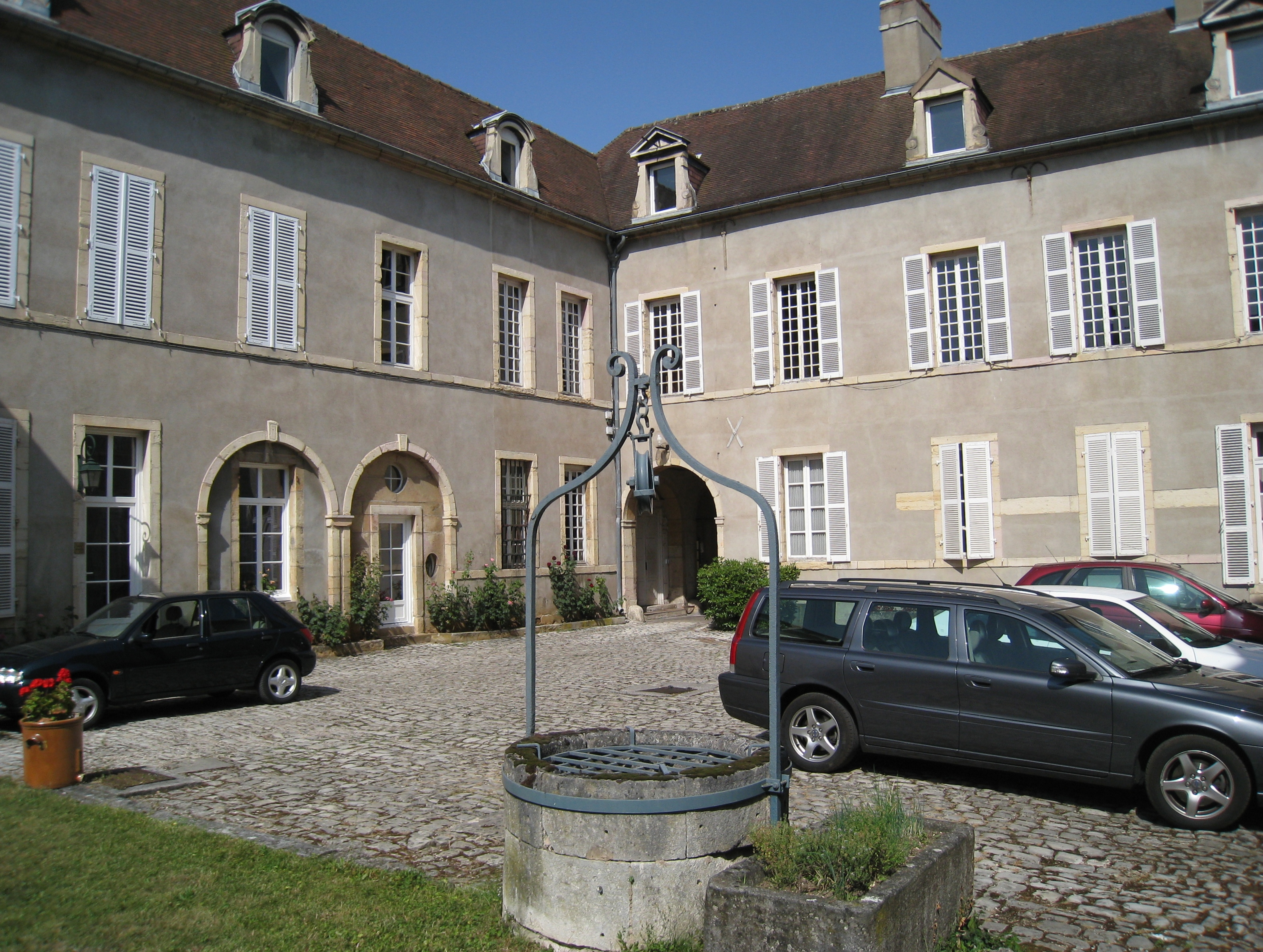 Hôtel de Cirey, Dijon, Bourgogne